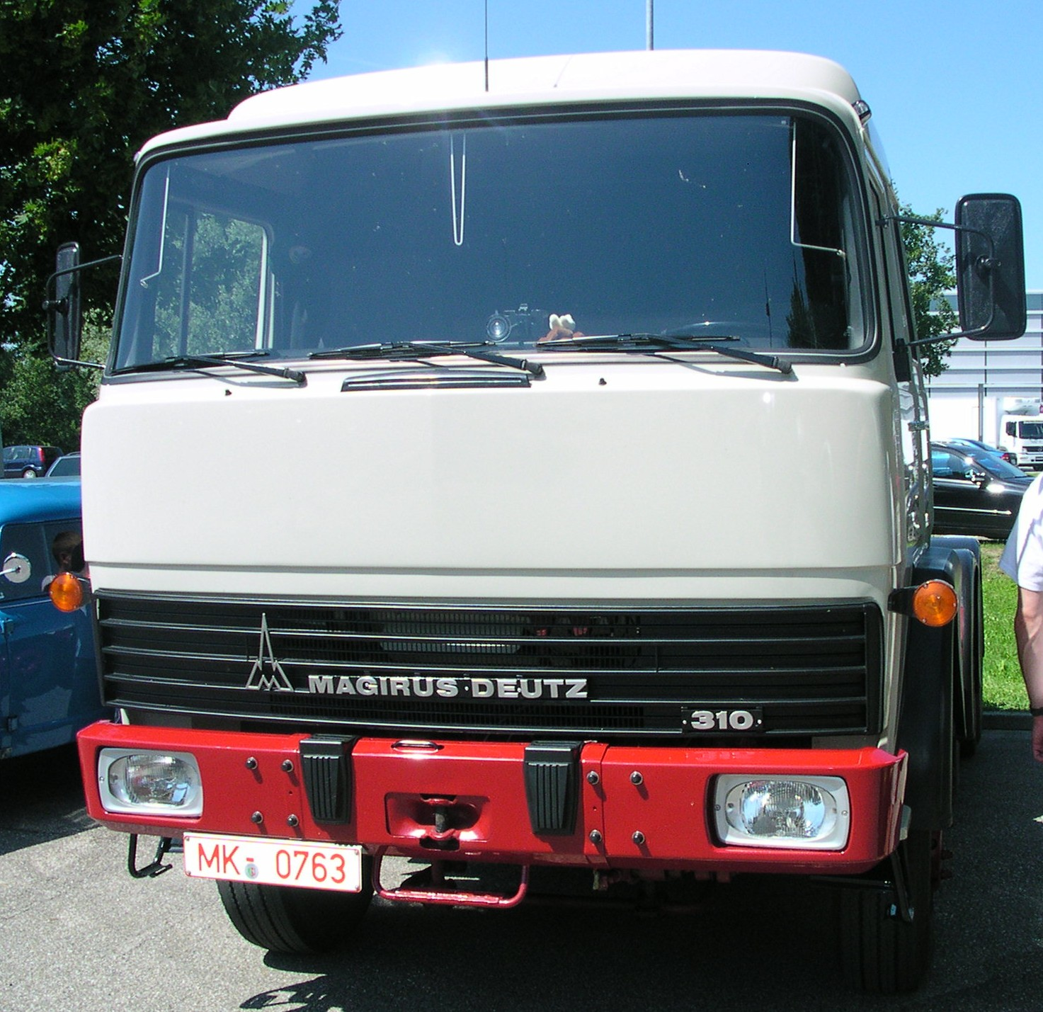 Wörth am Rhein, Oldtimer-Treffen bei Daimler-Chrysler Magirus Deutz Frontlenker Sattelzugmaschine mit Fernverkehrsfahrerhaus